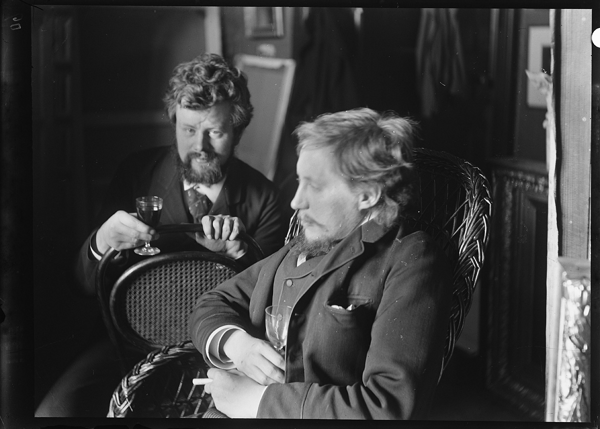 Hein Boeken en Willem Kloos in het atelier van Willem Witsen, Amsterdam, maart 1892. Foto door Willem Witsen